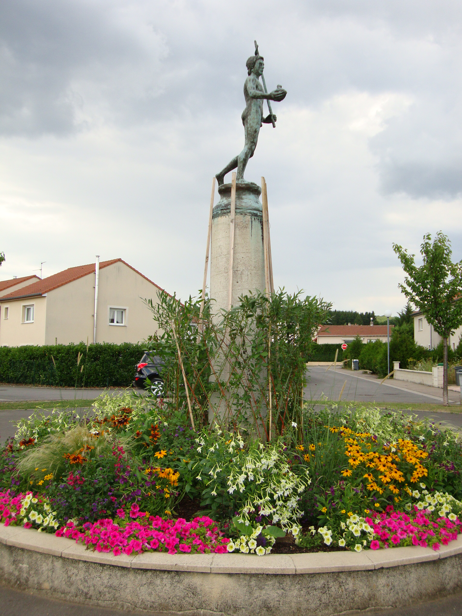 Statue de Mercure - Hettange-Grande (Moselle)